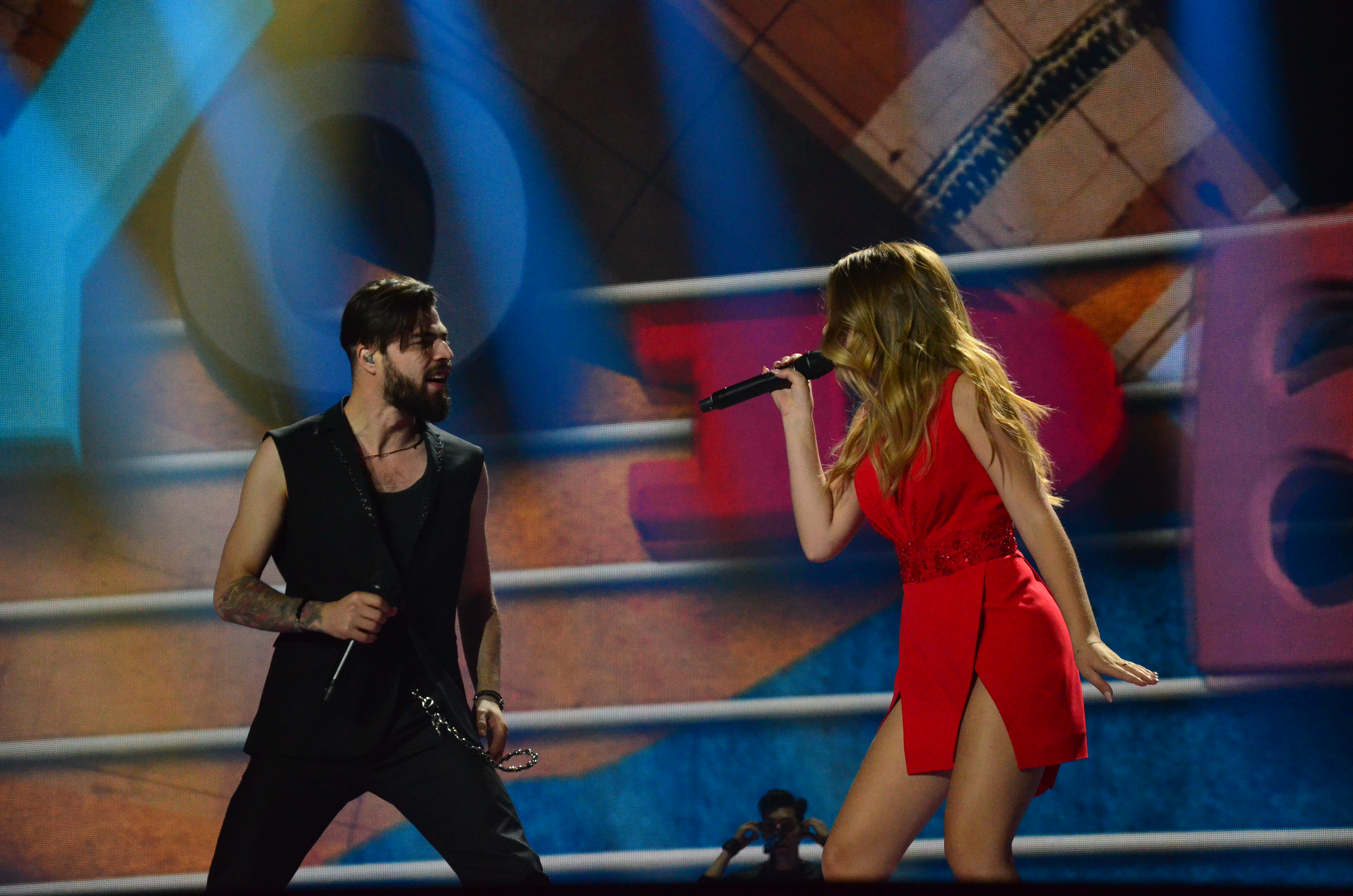 12 травня. Генеральна репетиція фіналу Євробачення 2017. Ilinca ft. Alex Florea (Romania)